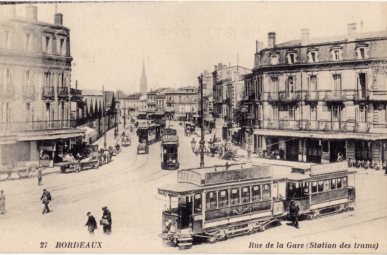 Carte postale ancienne sans mention d'éditeur, n°27 :BORDEAUX - Rue de la Gare (station des trams)